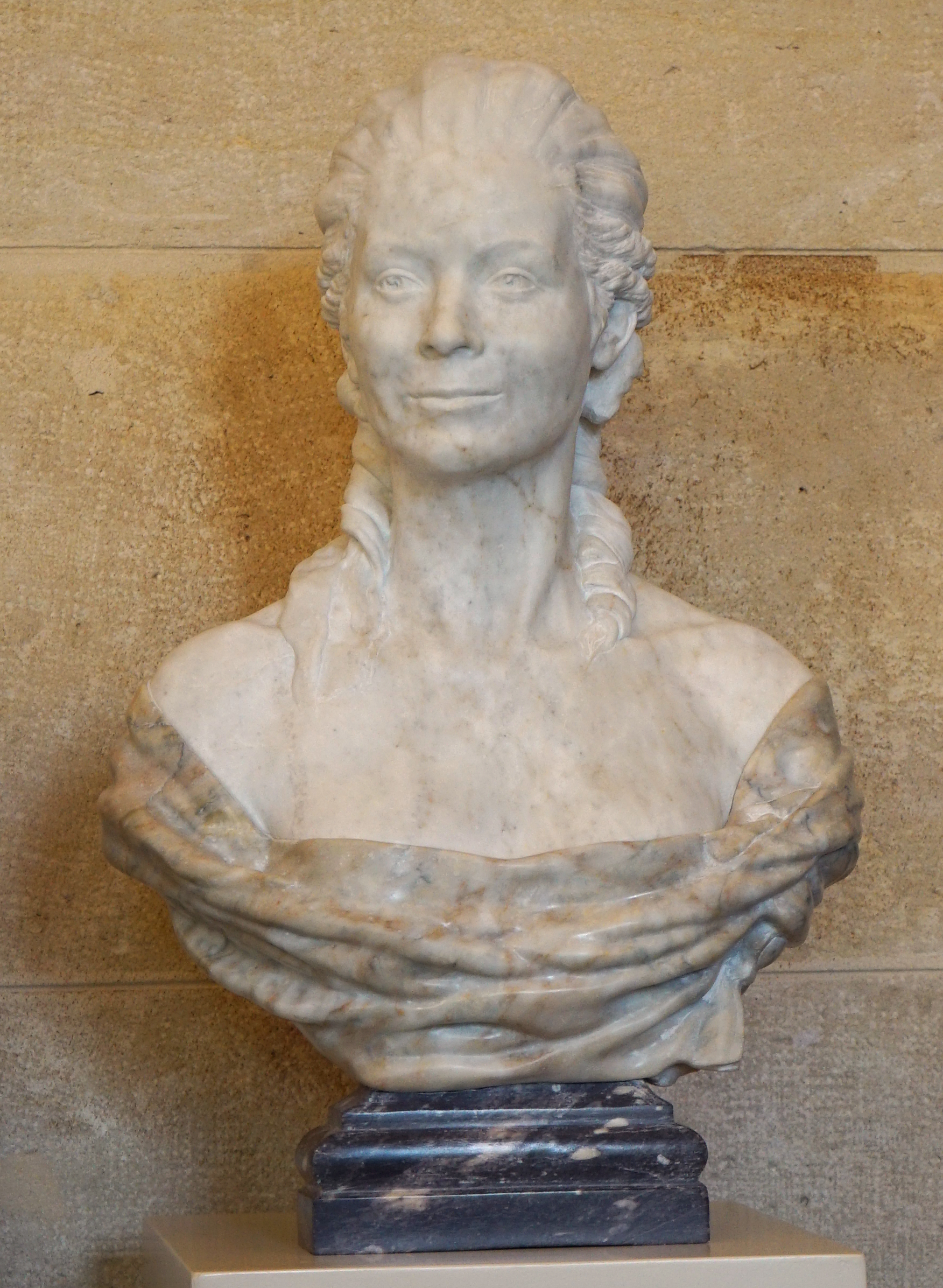 décor du palais de Bourbon-Condé.